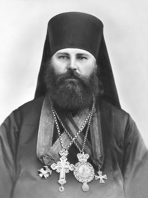 Еп. Григорий (Яцковский). Фотография. 10-е гг. XX в. (РГИА)